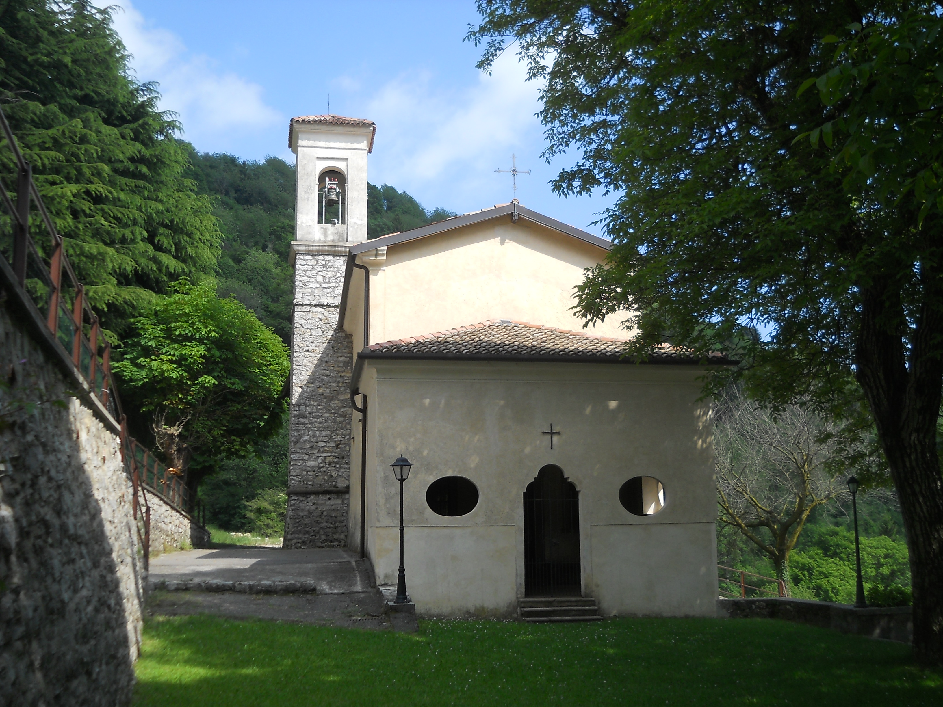 Santuario dei santi Faustino e Giovita ad Adrara San Rocco